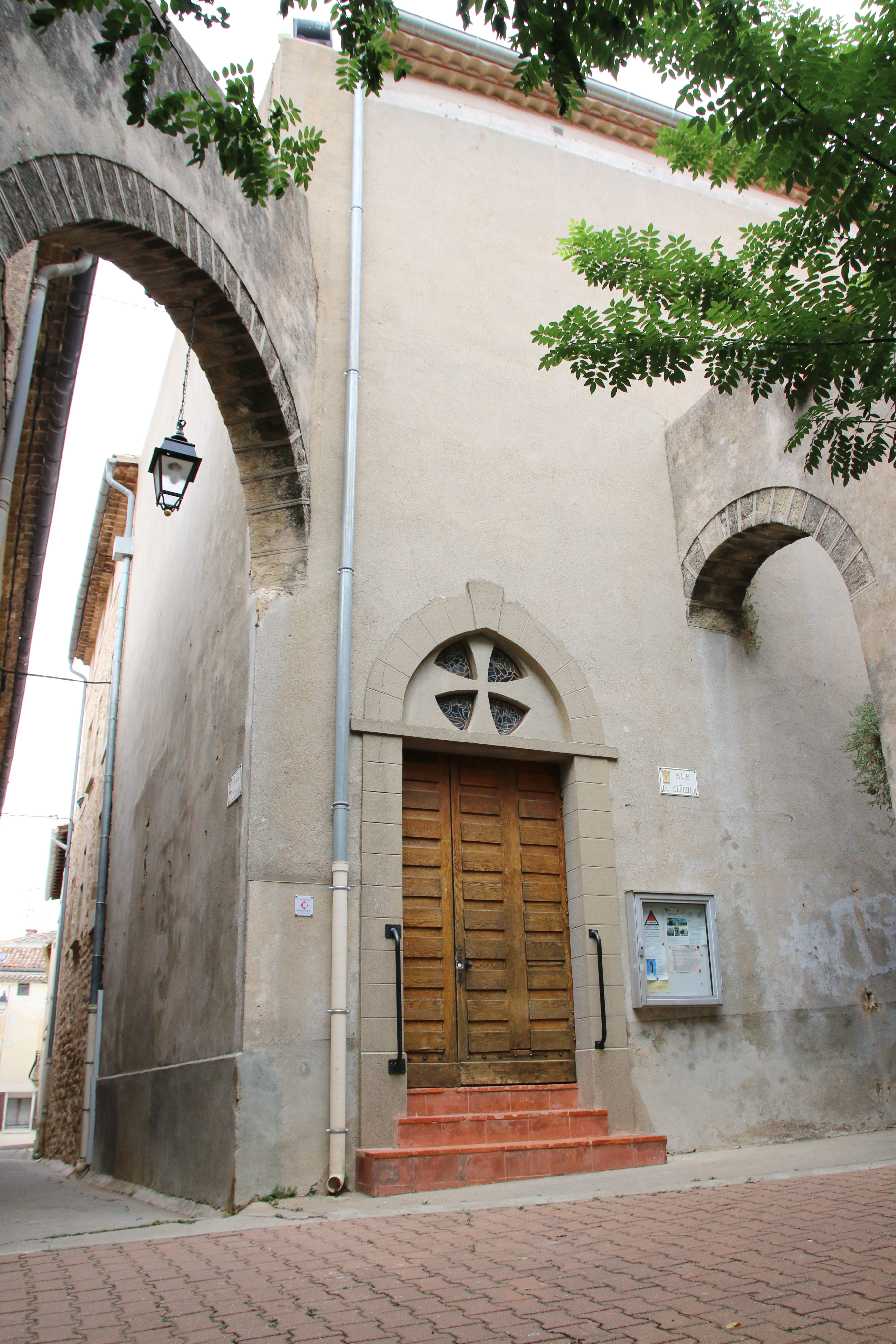 église Saint-Pierre de Vendémian